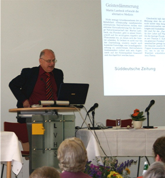 Prof. Martin Lambeck, Vortrag auf der Sommeruniversität Freckenhorst 2007